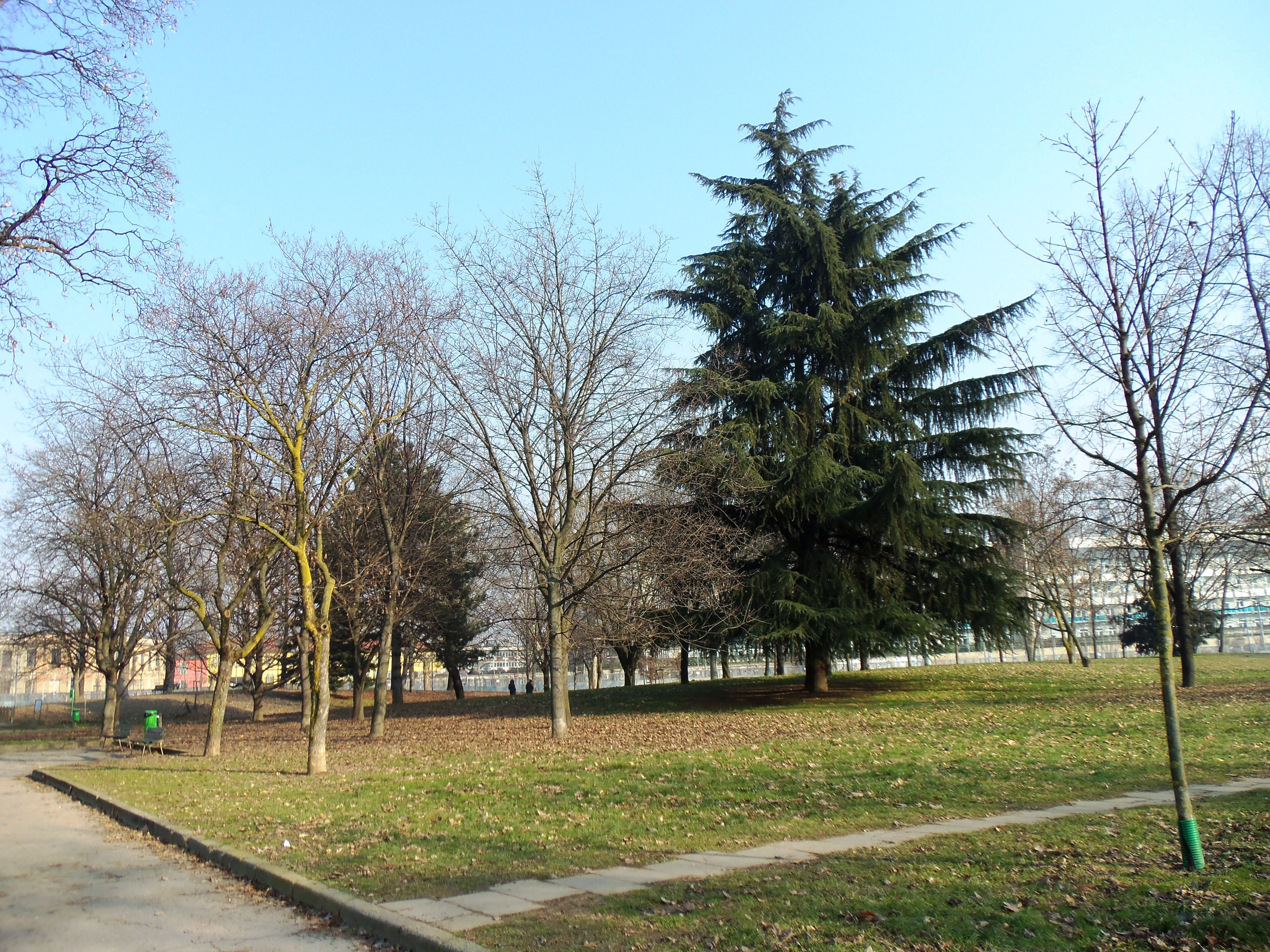 Milano, Parco Giovanni Testori (ex Parco Campo dei Fiori)